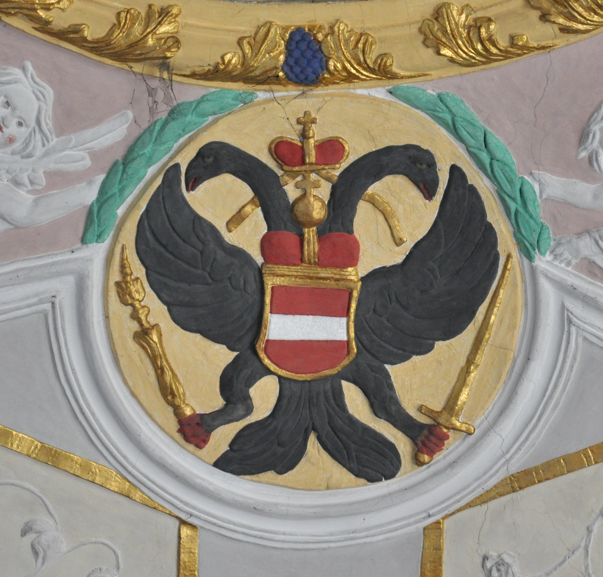 Pfärrich (Gemeinde Amtzell), Pfarr- und Wallfahrtskirche Mariä Geburt Chordecke, Relief von 1716, Herrschaftswappen der Patronatsherren von Pfärrich: Kaiseradler mit habsburgischem Herzschild